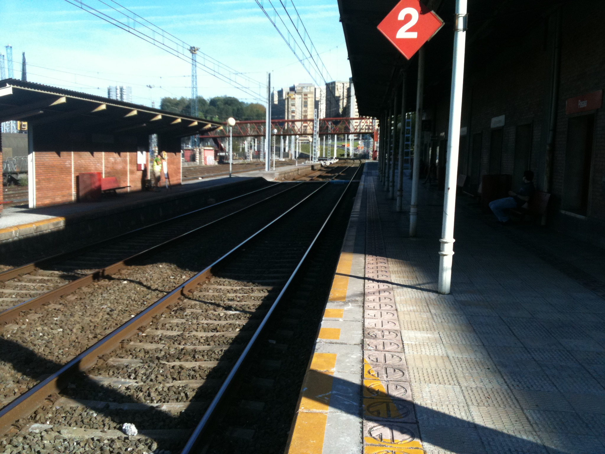 Vista de la estación